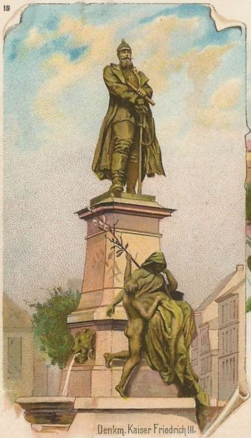 Fotografie des Kaiser-Friedrich-Denkmals auf dem Neumarkt vor dem Elberfelder Rathaus, Ausschnitt einer Postkarte von 1898.